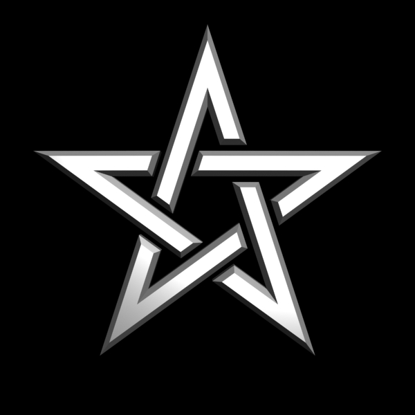 Pentagram, star